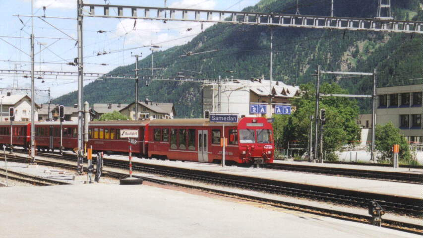 Der aus Scuol-Tarasp kommende BDt 1755 der RhB erreicht am de:22. Juni de:2003 Samedan. Aufnahme: Steffen Mokosch Lizenz: GNU FDL